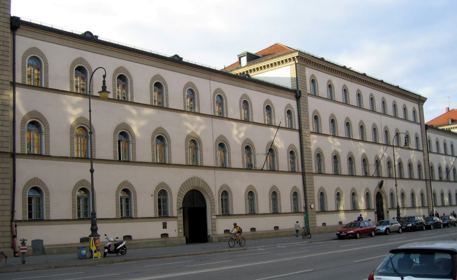 Gebäude des Bayerischen Verwaltungsgerichtshofes, Ludwigstraße 23 in München (Germany)